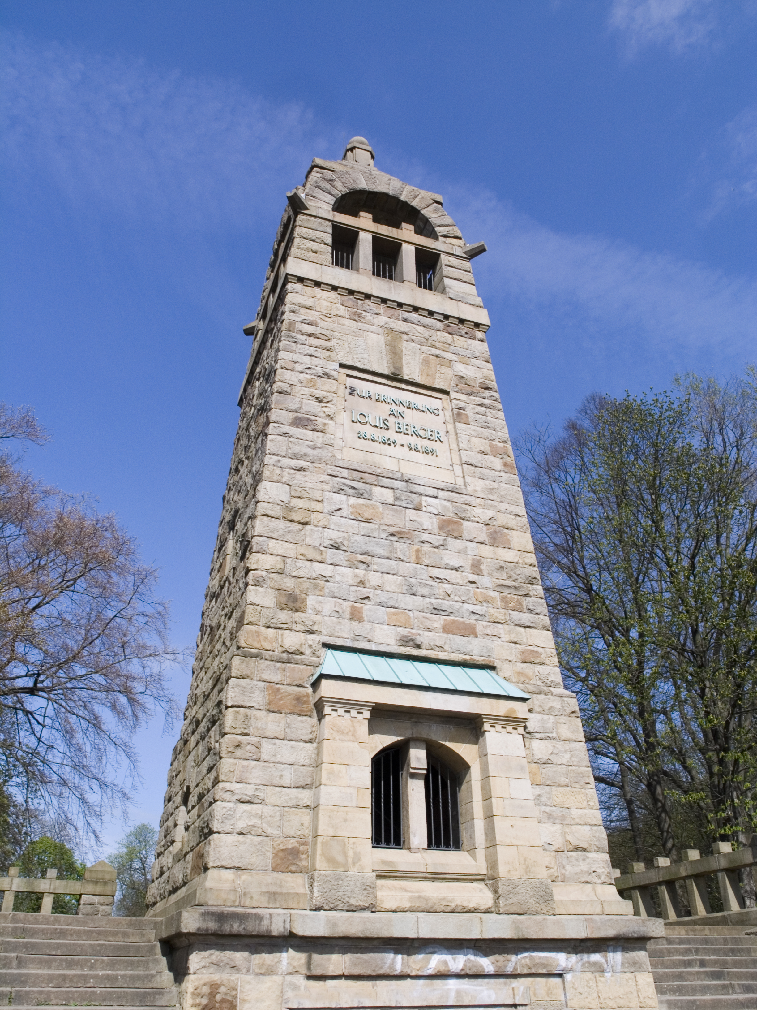 Северный Рейн - Вестфалия, Виттен - монумент Бергера This is a photograph of an architectural monument.